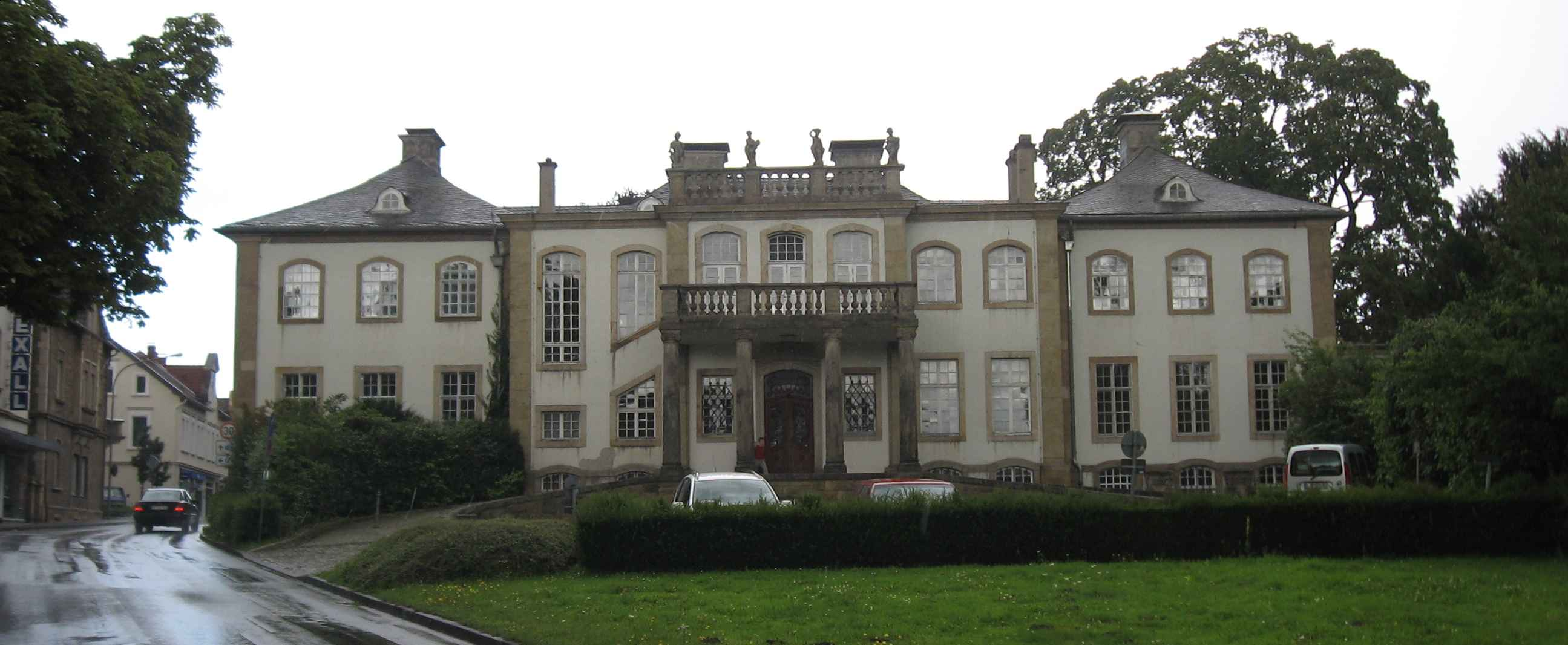 Schloss Stietencron in Schötmar, 2007